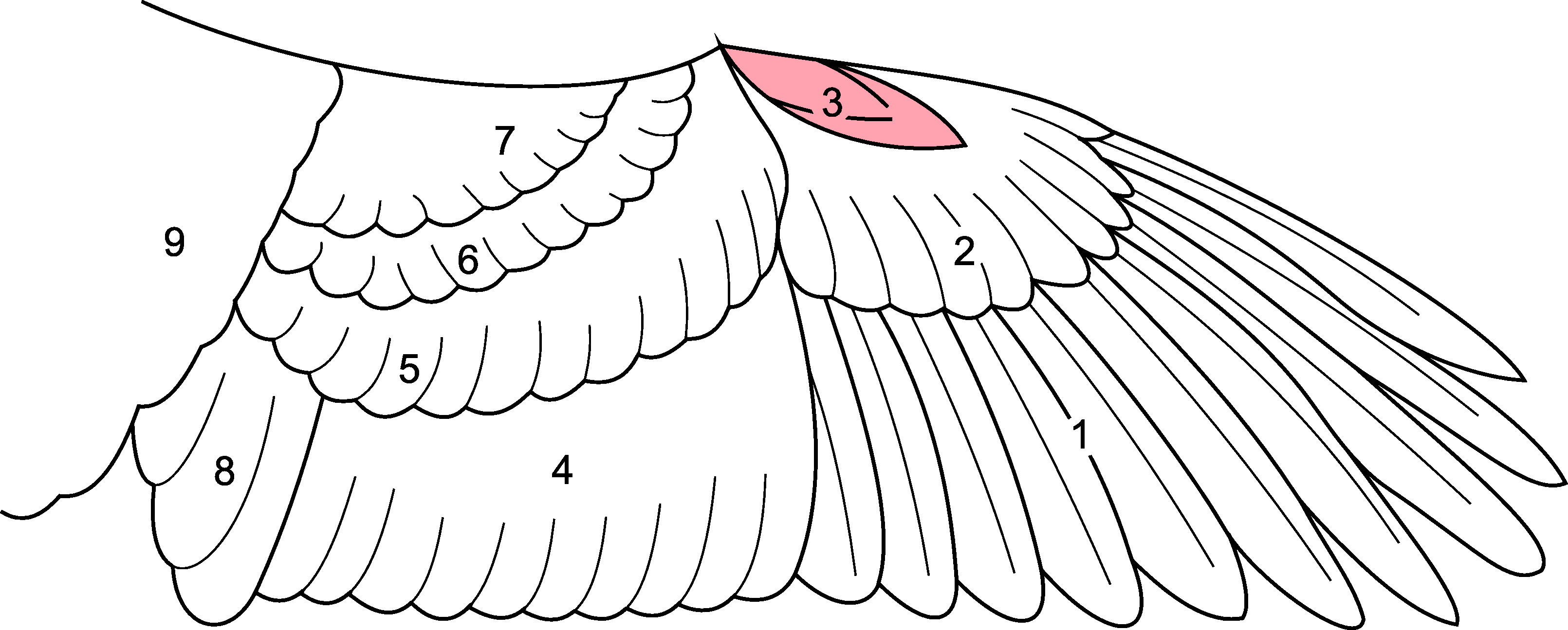 Alula